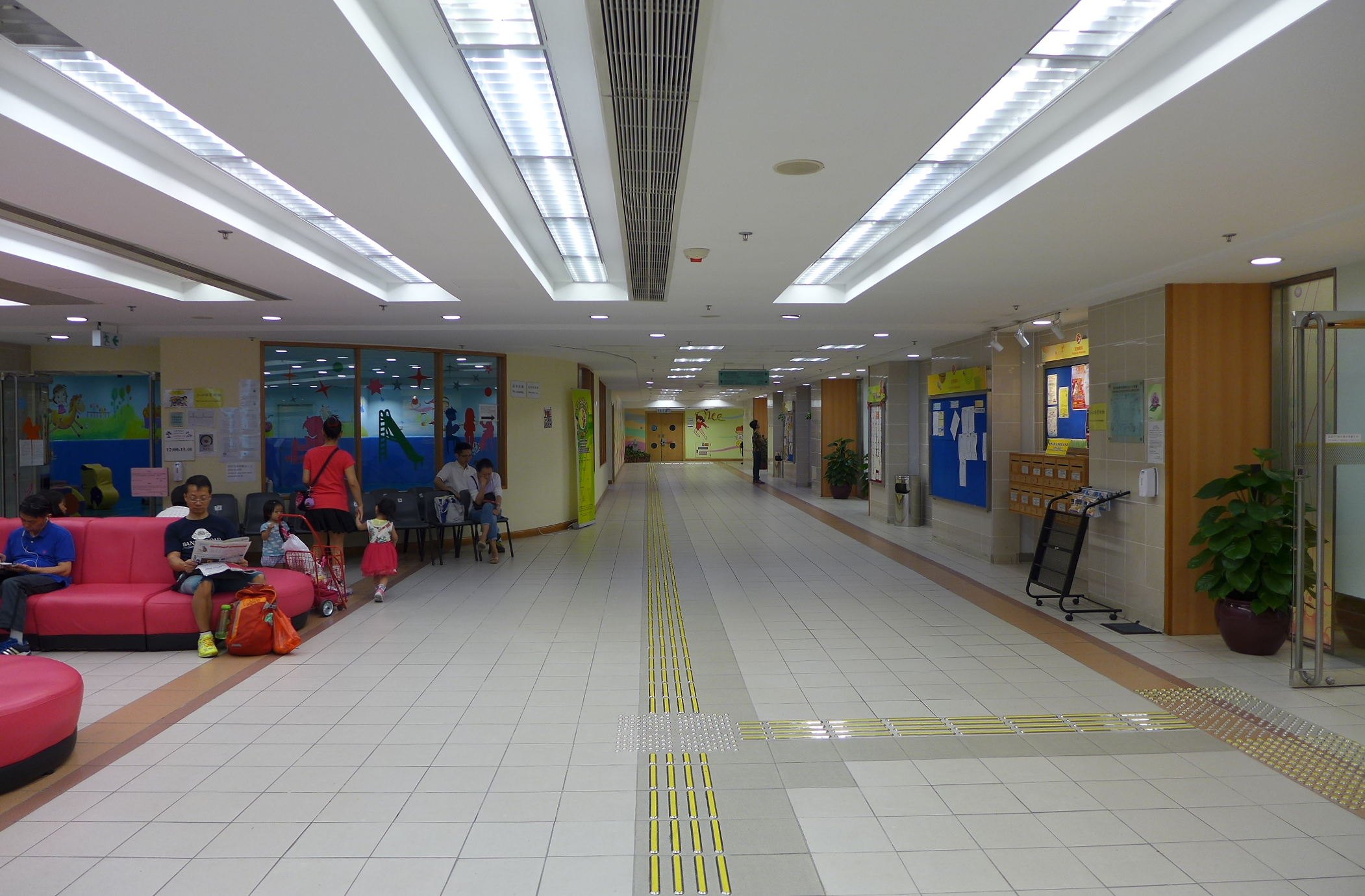 Luen Wo Hui Sports Centre